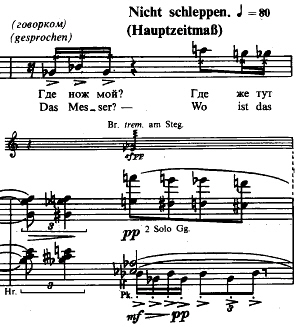 Берг. Воццек (клавир, фрагмент III акта). Пример нотации Sprechstimme